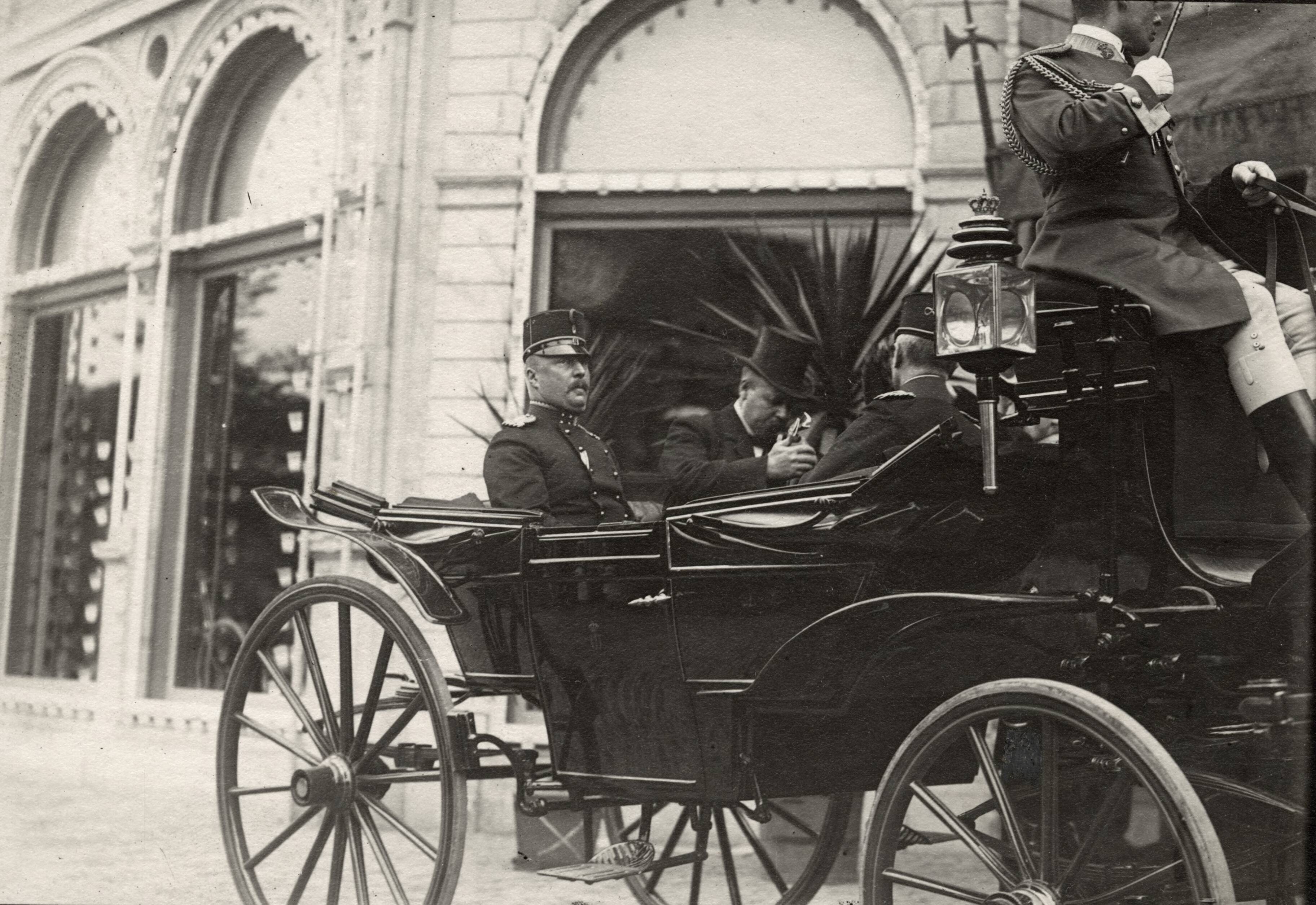 .In 1909 bezoekt prins Hendrik de Fongers Rijwielfabrieken in Groningen. Foto: na zijn bezoek verlaat de Prins (2e van links) per rijtuig de fabriek.